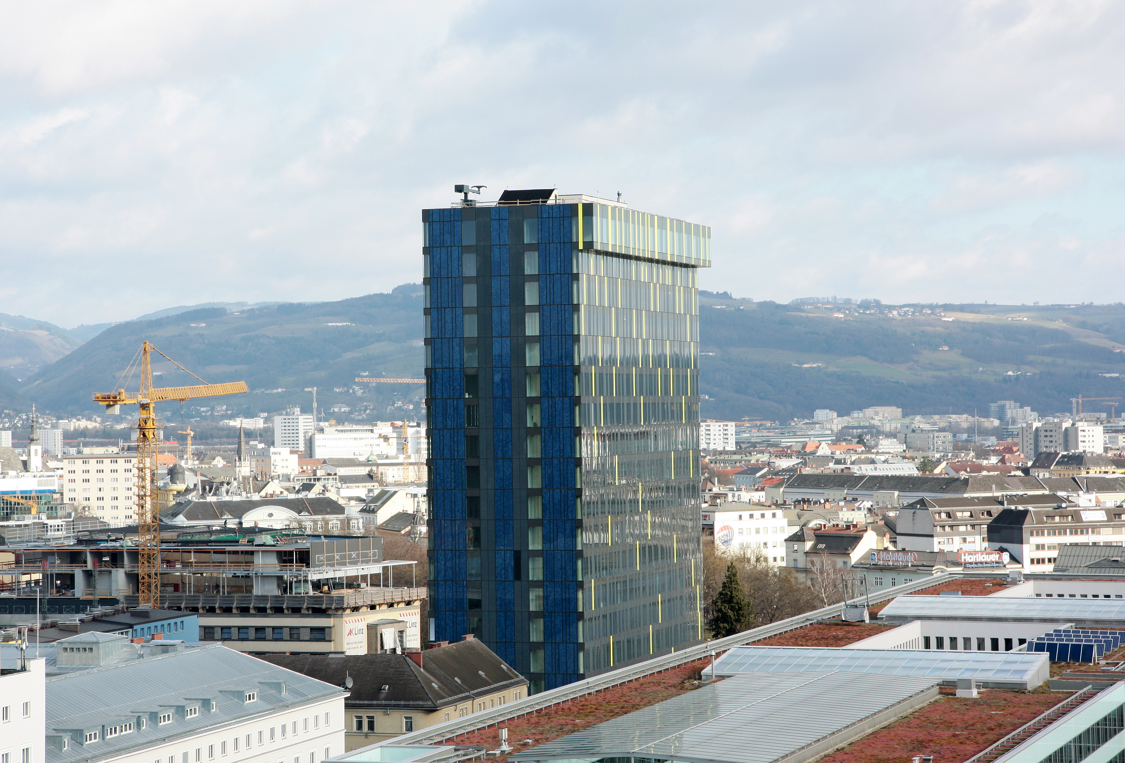 Der Power Tower der Energie AG im Bahnhofsviertel.